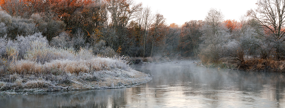 Река Нерусса. Заповедник "Брянский лес"